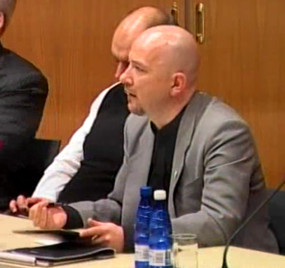 Peeter Paul Mõtsküla ACTA lepingu arutelul